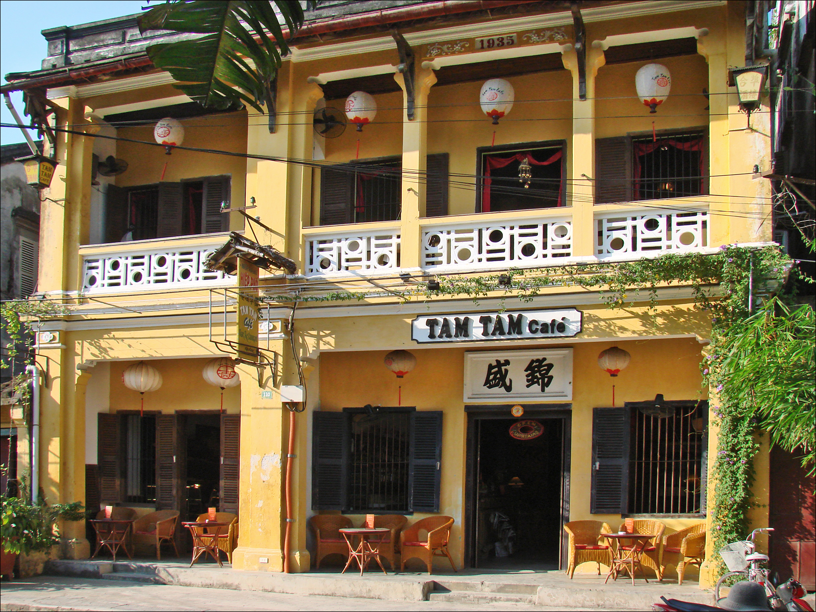 Nhà kiểu Pháp ở Hội An.